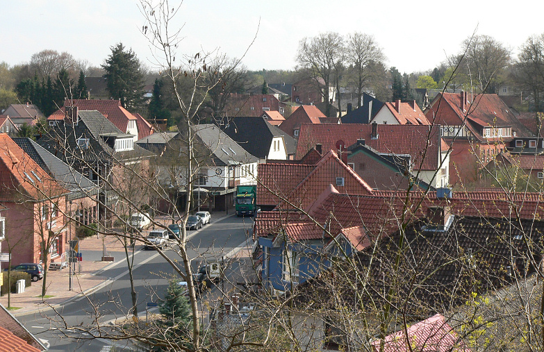 Hankensbüttel